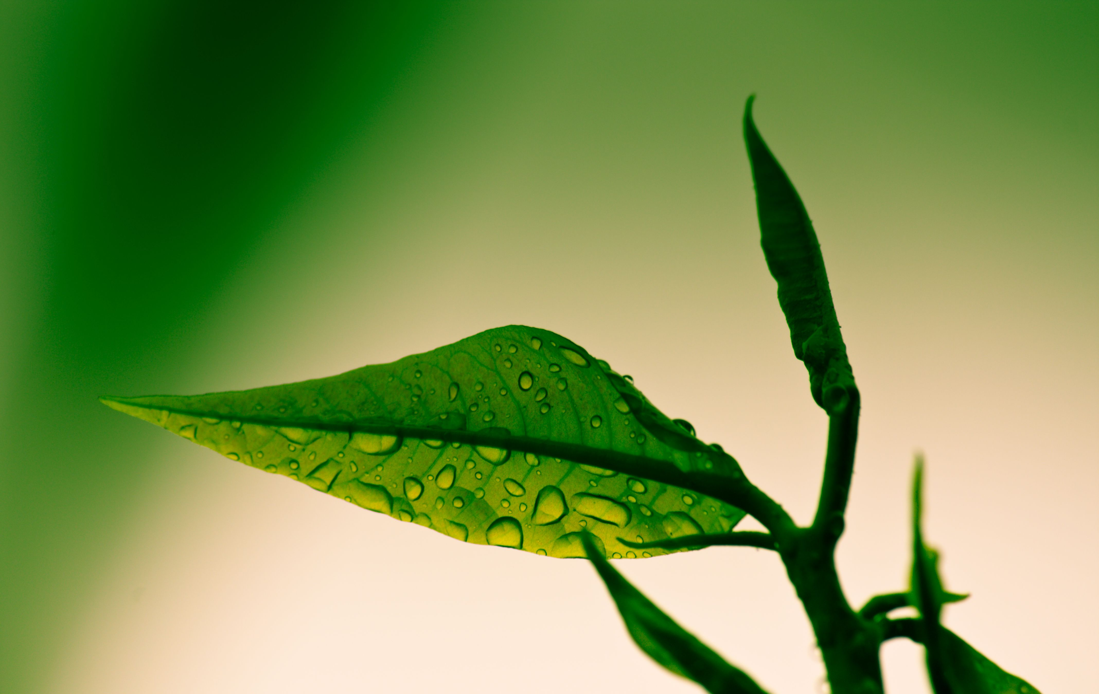 B Green